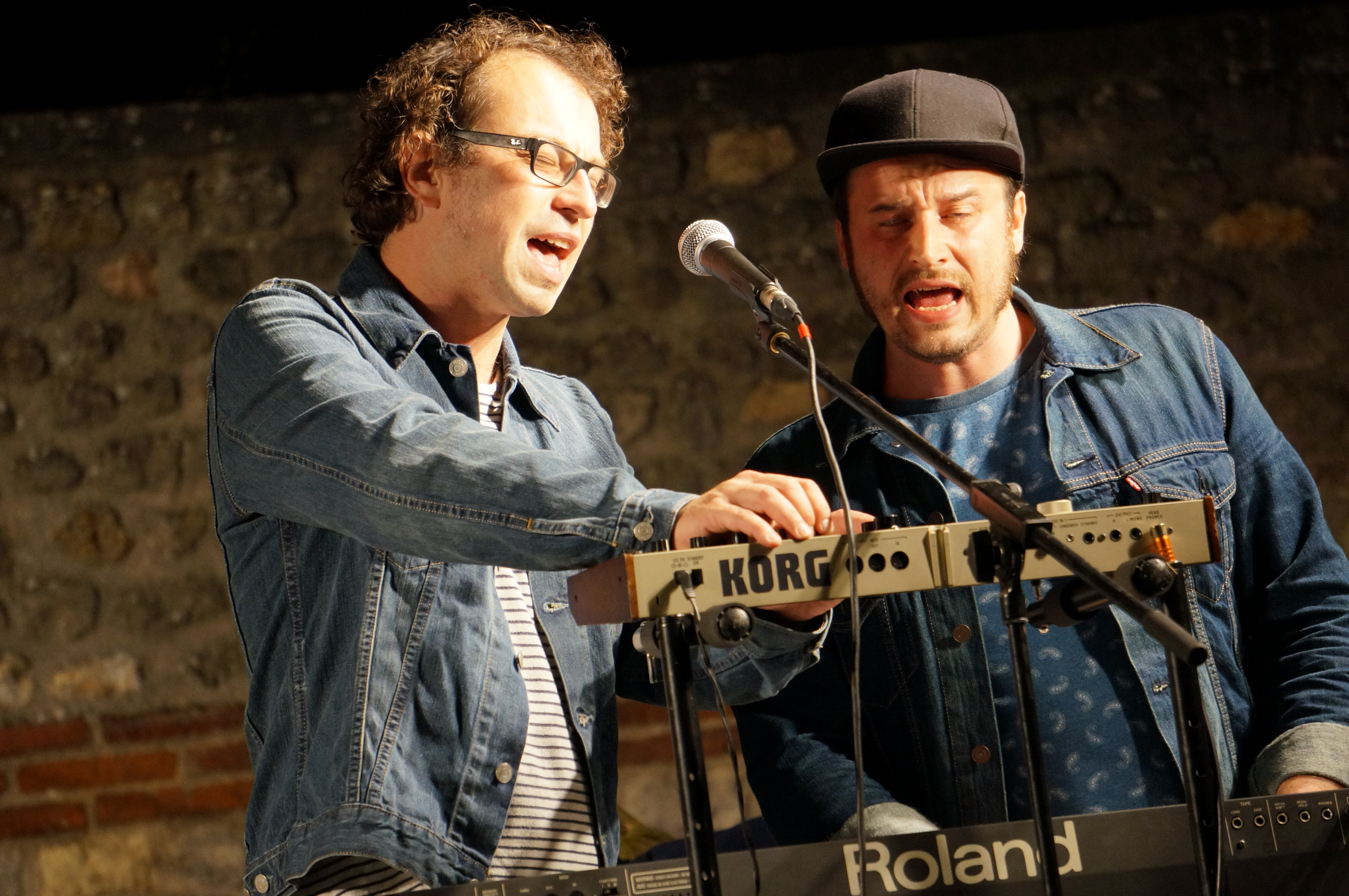 concert de cloture d'"Un été à Reims de 2013" du projet "Bats Brigade", Sébastien Adam Nicolas Karst.